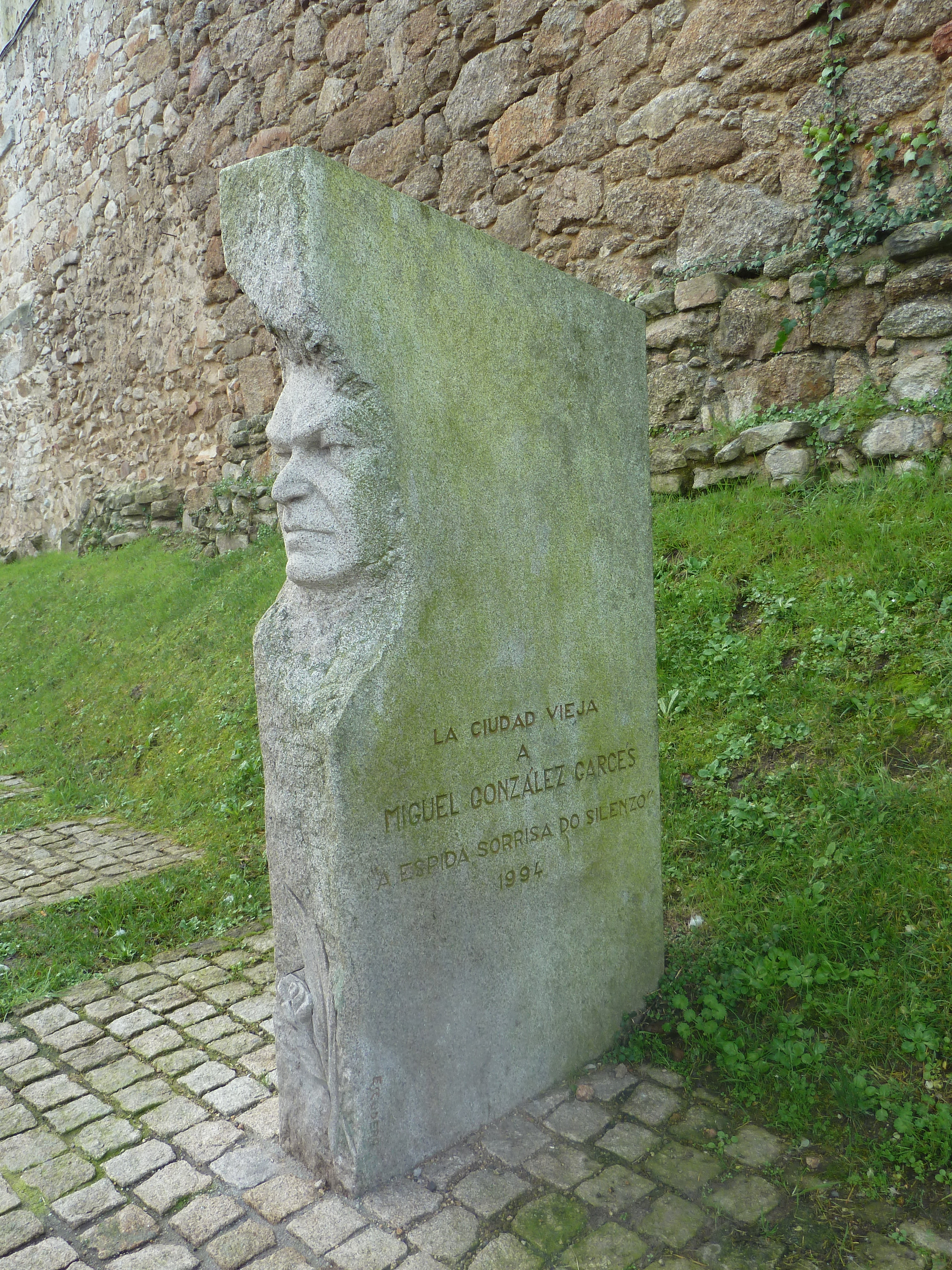 Monumento a Miguel González Garcés en frente do Rectorado a Universidade da Coruña.